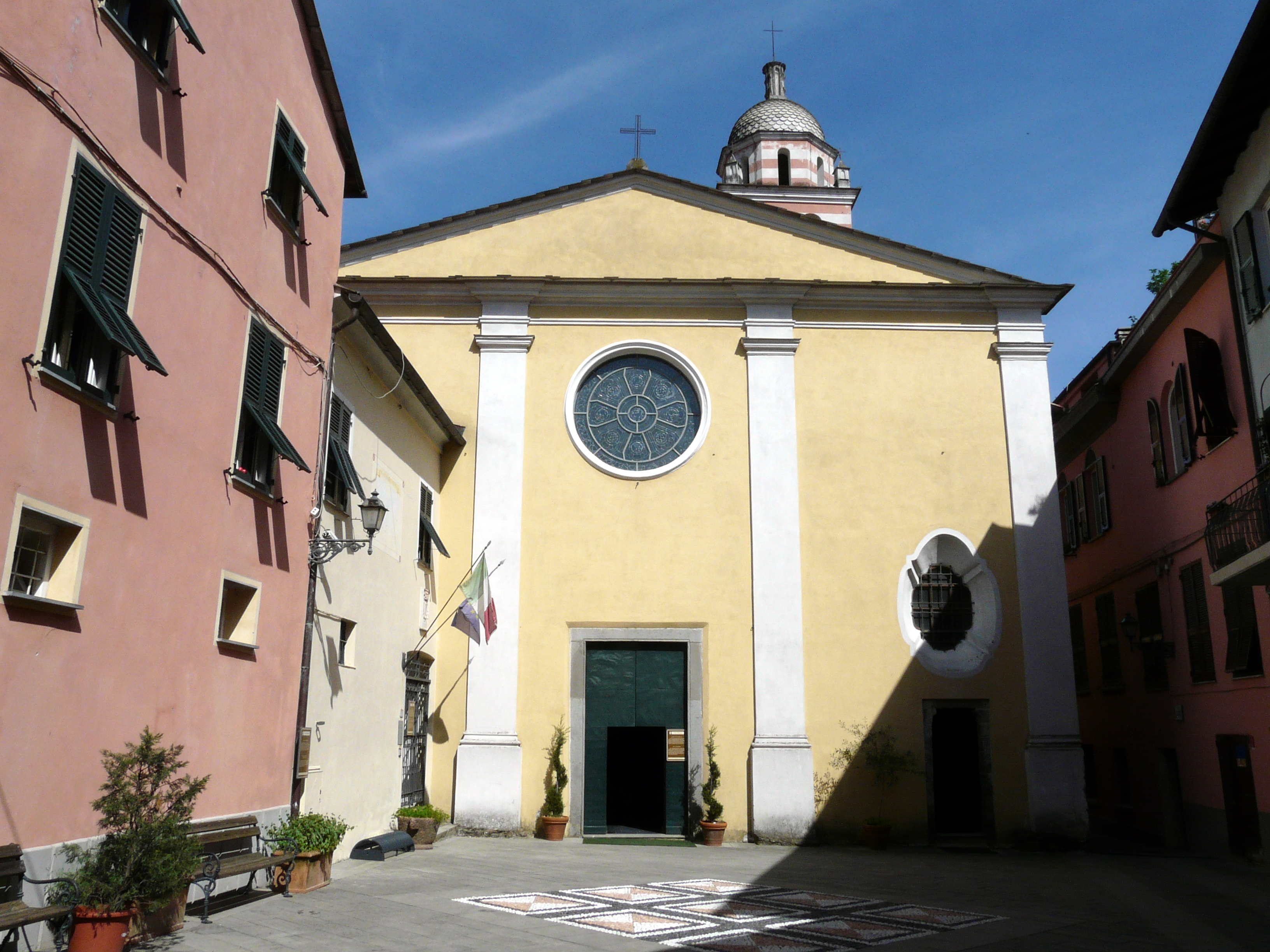 Facciata della cattedrale di Brugnato, Liguria, Italia